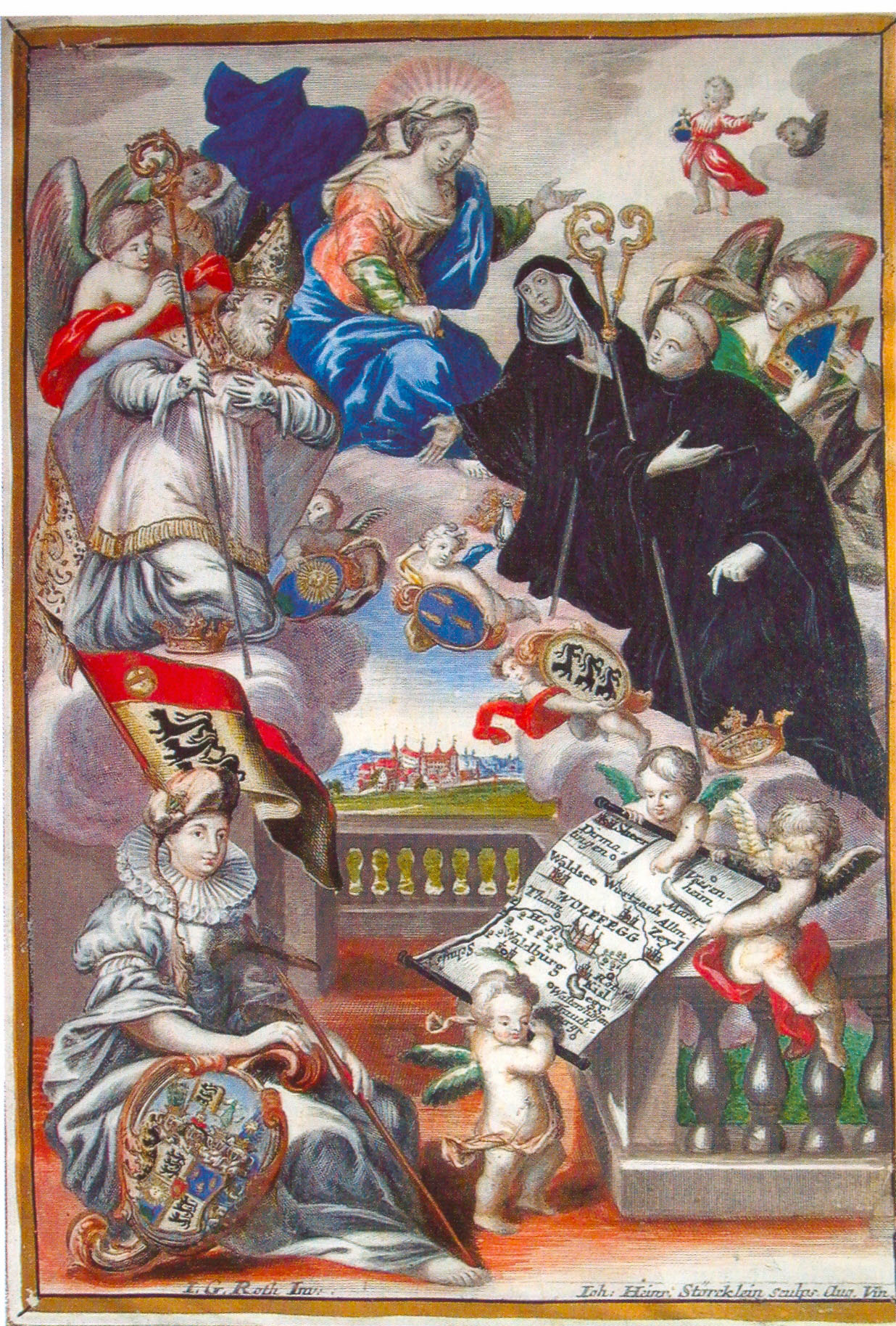 Die Patrone der fürstlichen Familie Waldburg Die heiligen Geschwister Wunibald, Willibald und Walburga Kolorierter Kupferstich